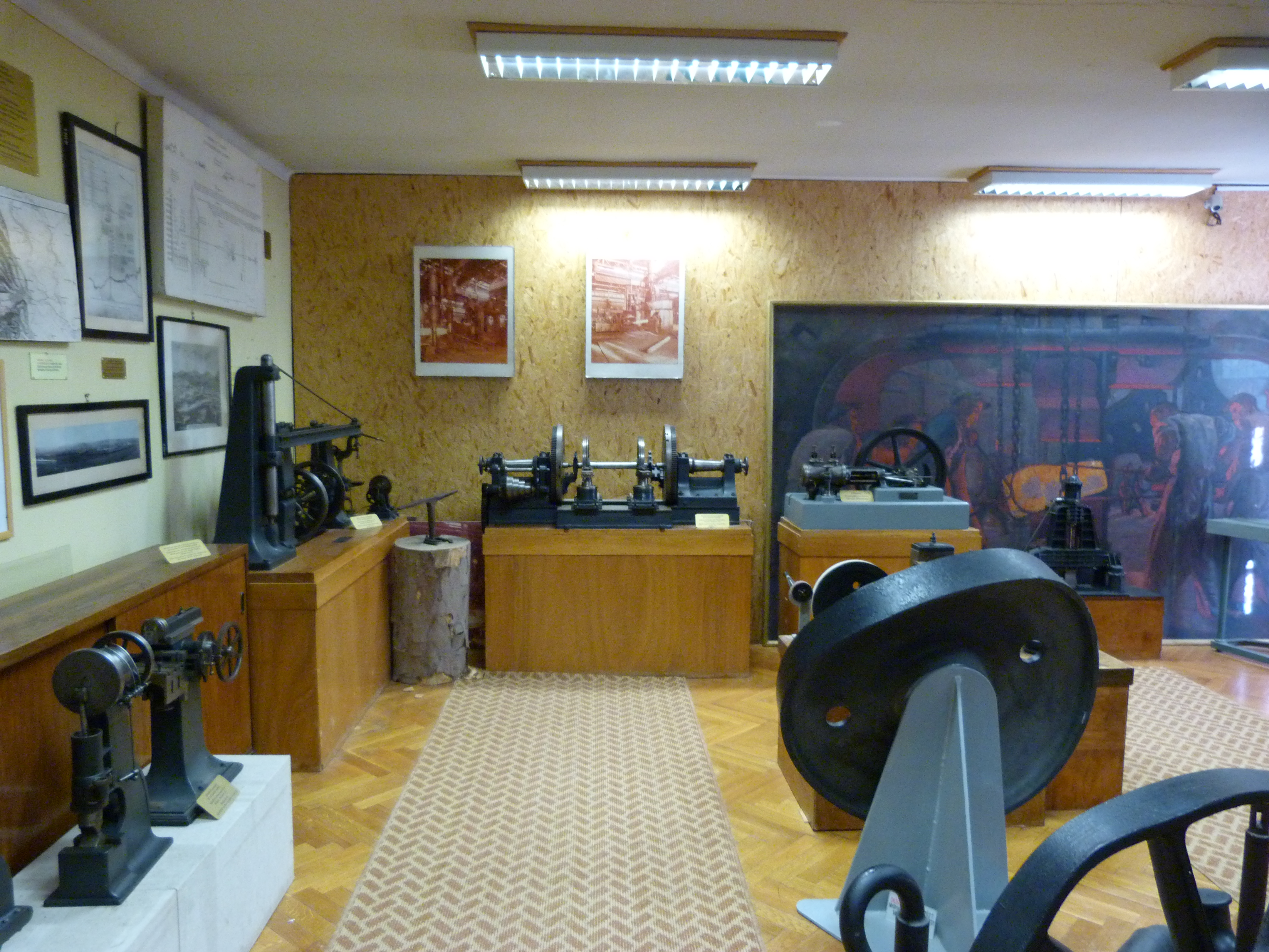 A felvétel 2015. február 7-én készült Miskolcban. Kohászati Múzeum. ©© Derzsi Elekes Andor, Budapest, 2015, A kép másolását, bármilyen úton történő sokszorosítását és felhasználását a szerző ellenérték nélkül, jogutódjaira is kihatóan megengedi. Az engedély kiterjed a kereskedelmi célú hasznosításra is. Kéri azonban nevének feltüntetését a felhasználás során. A Metapolisz sorozat valamennyi képe és filmje Creative Commons alatti valamint kereskedelmi - for profit - célra is felhasználható. Ajánlott hivatkozás: Derzsi Elekes Andor: Metapolisz DVD line